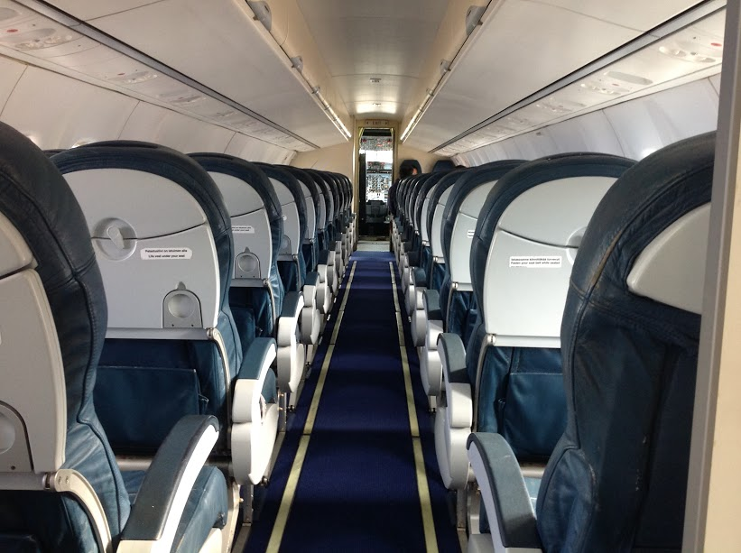 Interior Aeronave ATR de EASYFLY